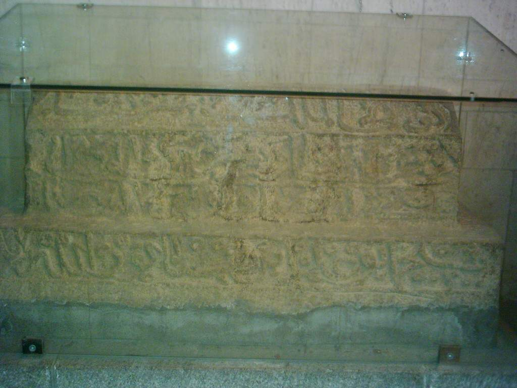 قبر ابن سینا